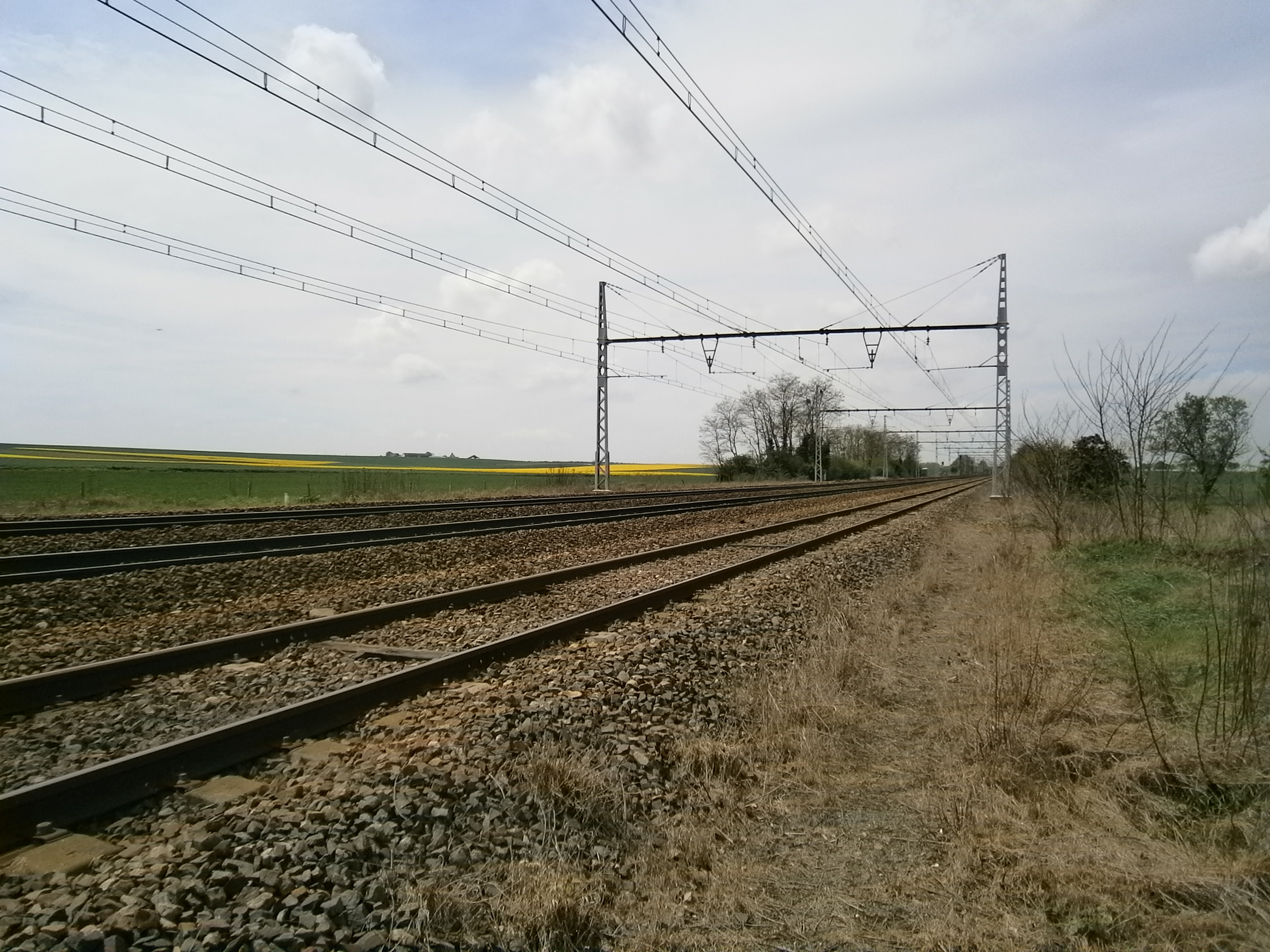 La ligne de Paris-Montparnasse à Brest (vue en direction de Brest), à Hanches (28).